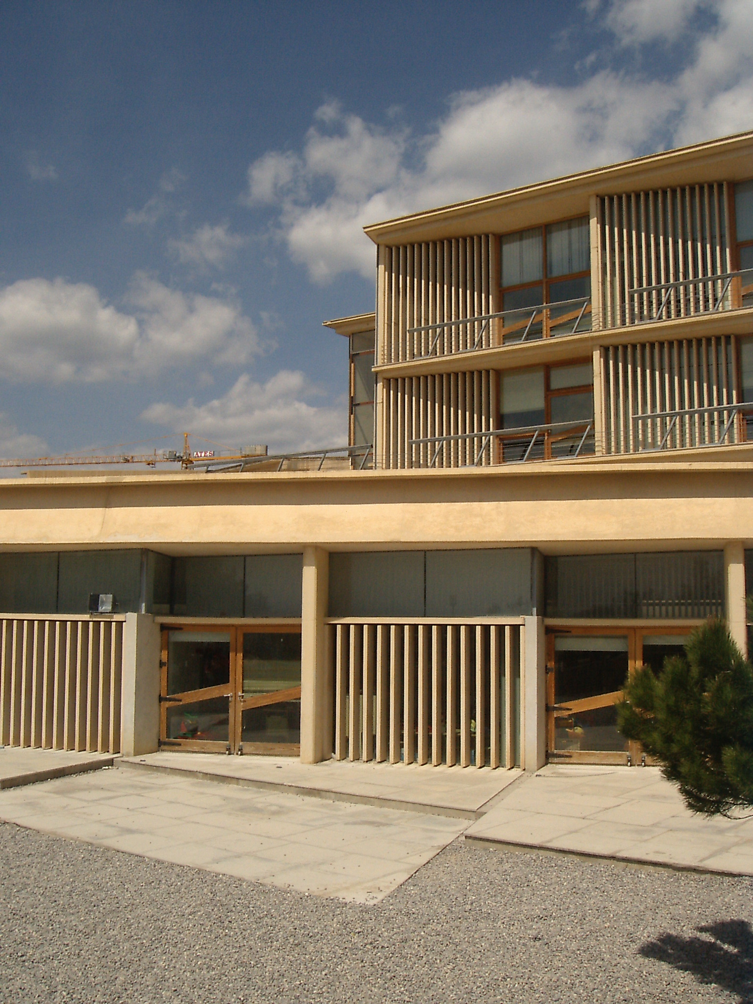 Escuela Llar de Morella. Arquitecta: Carme Pinós i Desplat